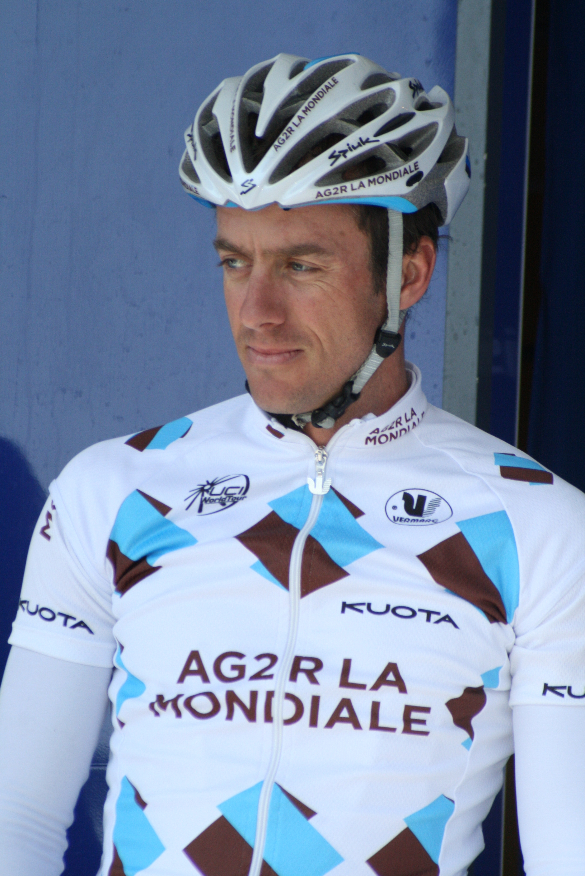 Présentation des coureurs au départ de la première étape Sébastien Hinault